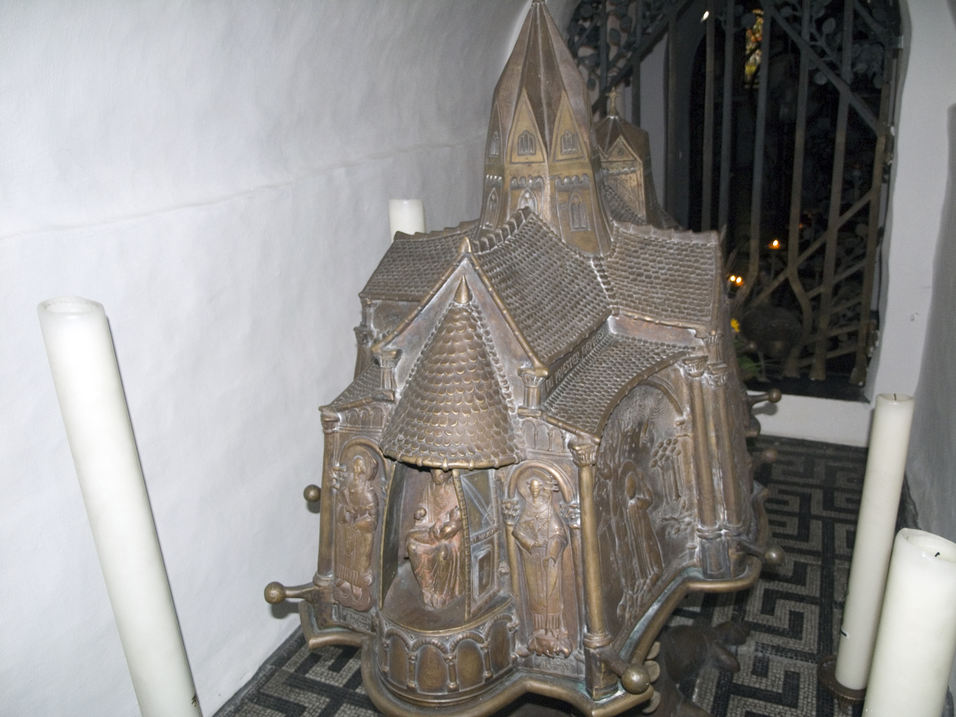 Северный Рейн-Вестфалия, Эссен, Верден - Верденское аббатство, церковь Святого Людгера (саркофаг Альтфрида Мюнстерского)